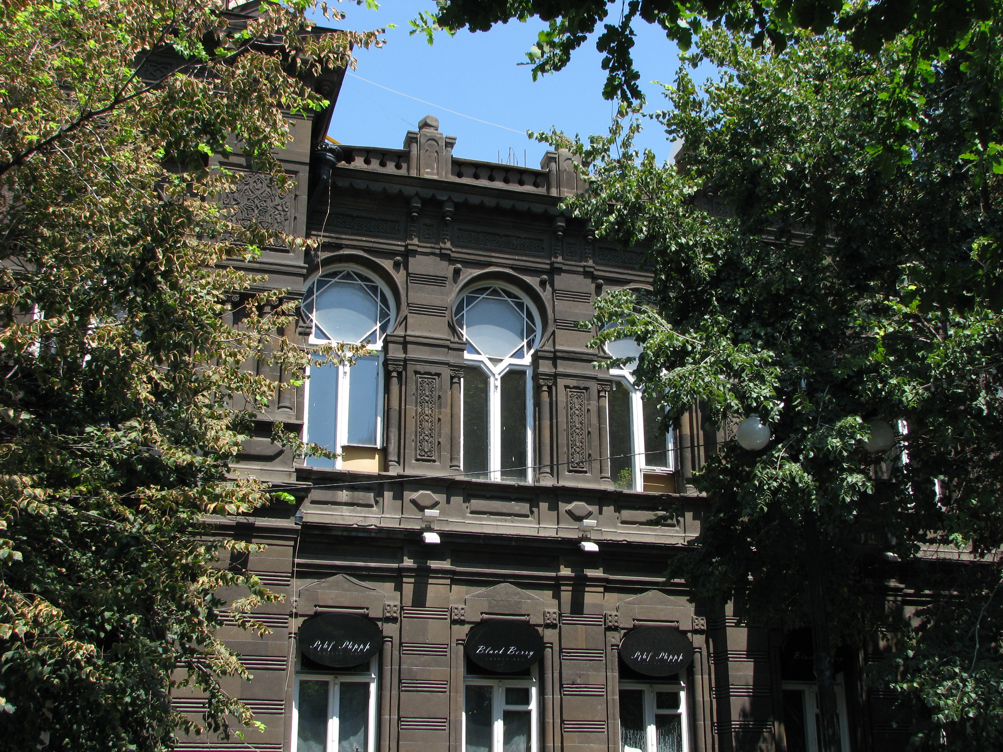 ԱՕԿՍ-ի շենքը կառուցվել է 1915 թվականին` բժիշկ Հովհաննես Հովհաննիսյանի պատվերով 6/178.4.3